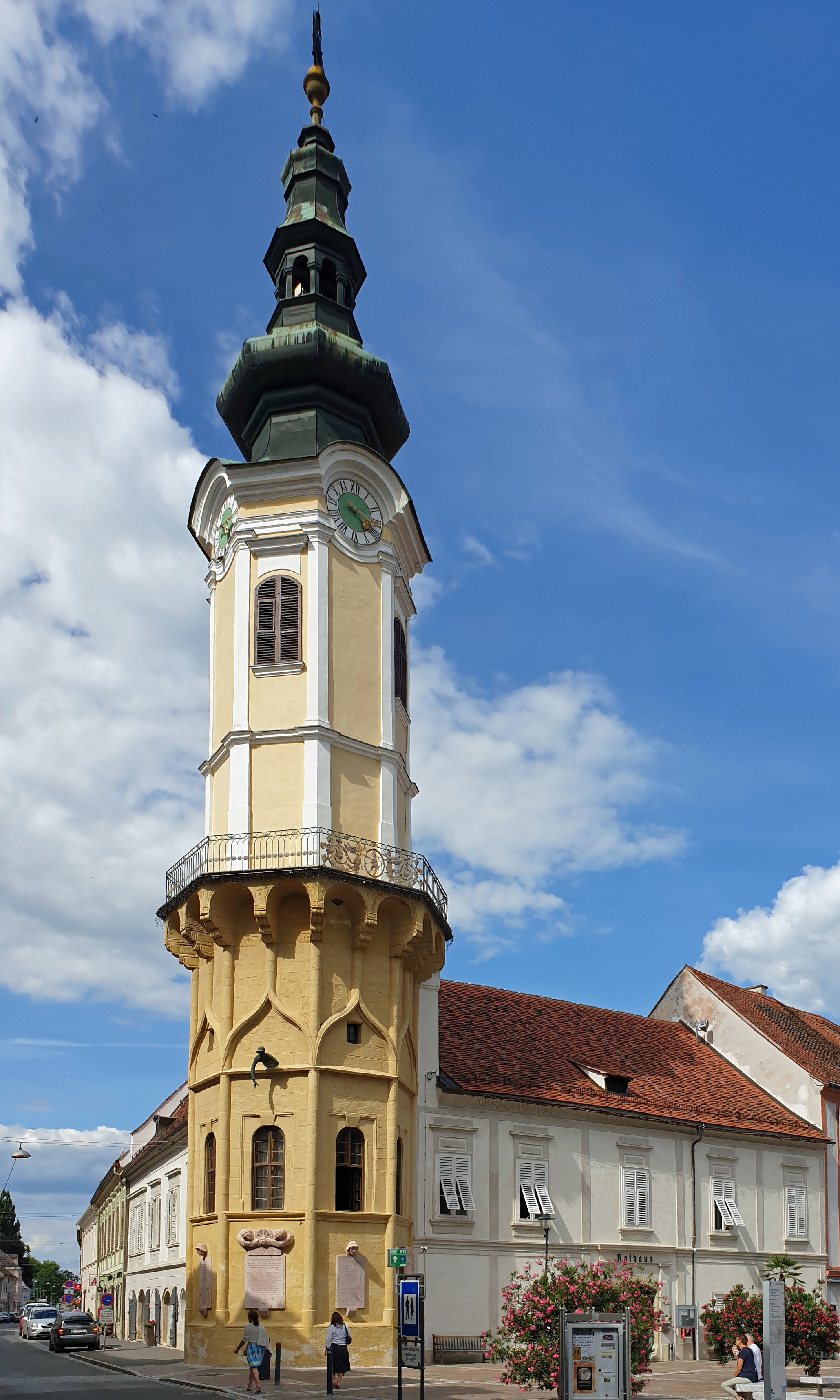 Rathaus